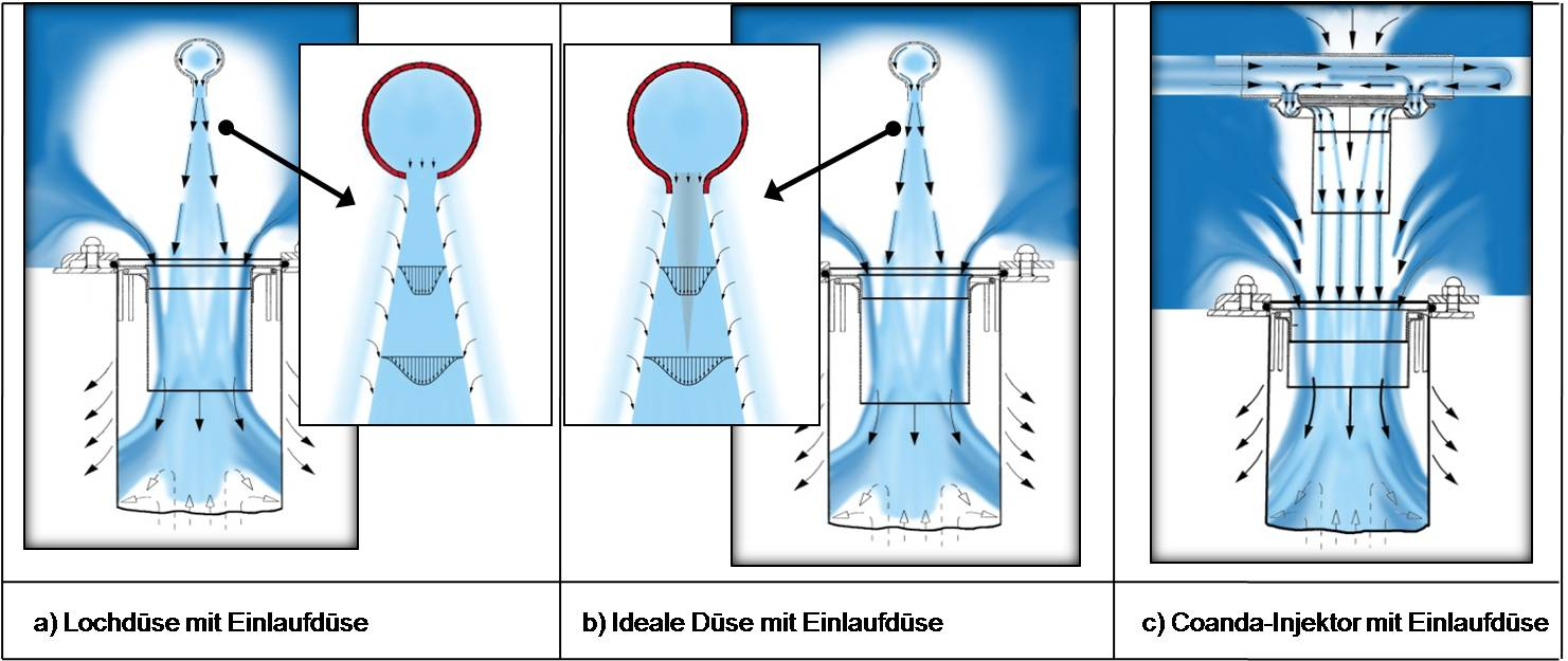 Unterschiedliche Darstellungen der Injektorsysteme Blasrohr mit einfacher Bohrung, Blasrohr mit Idealer Düse und Coanda-Injektor